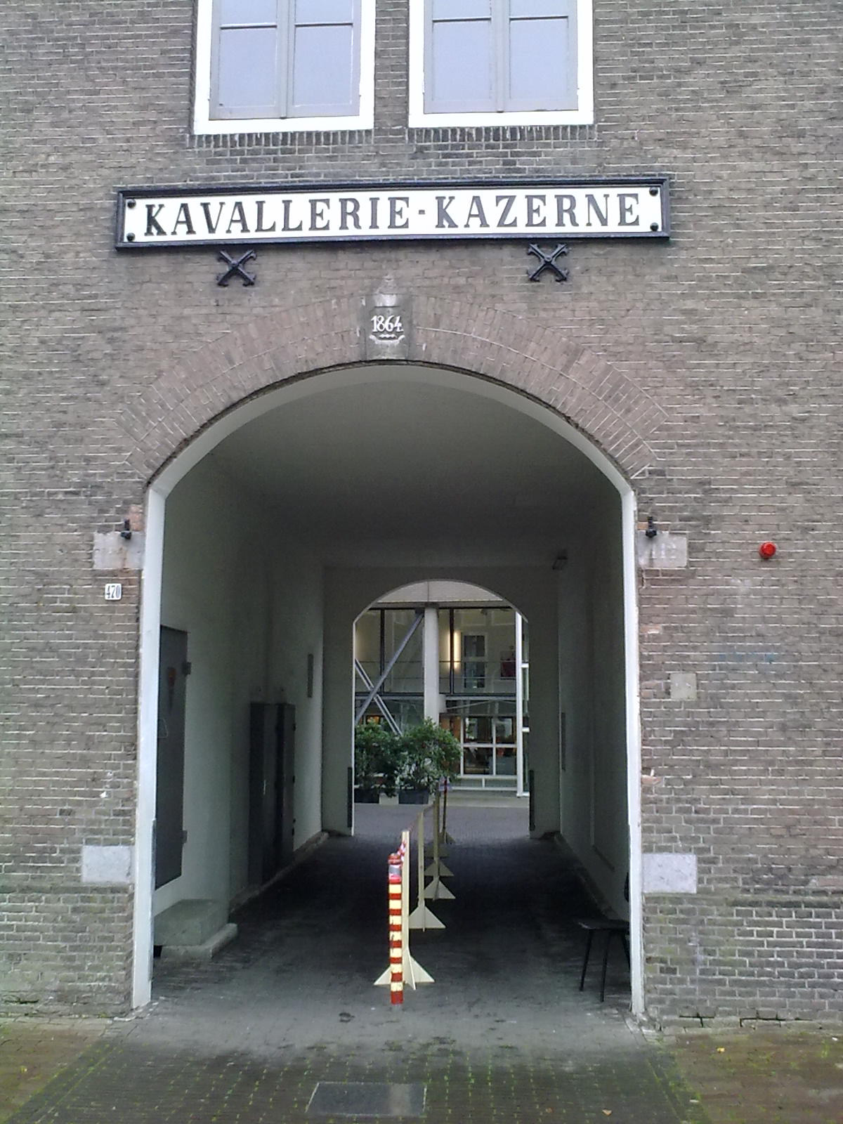 Poort van de voormalige cavaleriekazerne aan de Sarphatistraat in Amsterdam, sinds 1992 Rijksacademie van Beeldende Kunsten. Boven de poort de tekst "KAVALLERIE·KAZERNE" en het jaartal 1864. De poort was zo ontworpen dat er twee paarden tegelijk door konden. Op de achtergrond is de nieuwbouw op de binnenplaats te zien.